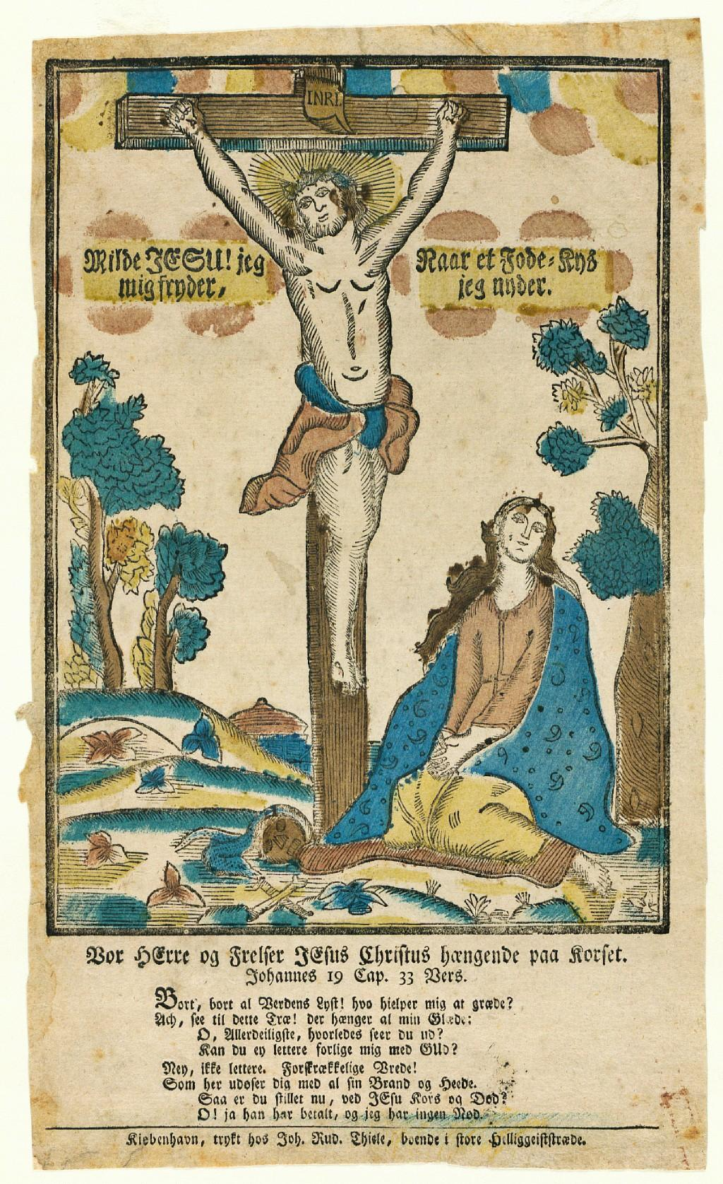 Vor HErre og Frelser JEsus Christus hængende paa Korset. Bogtrykker Johan Rudolph Thiele